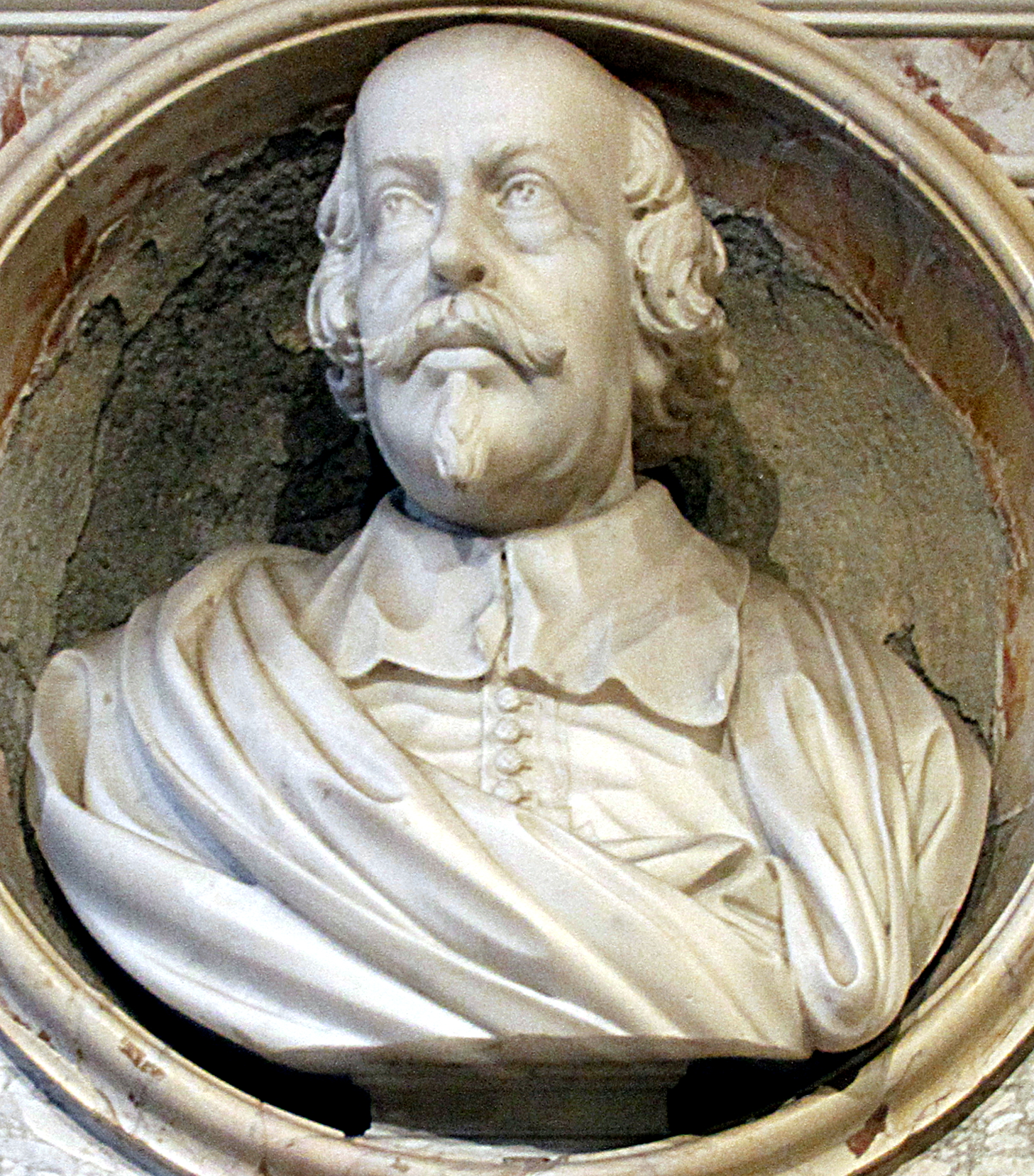 Crypt of Santi Luca e Martina - Rome